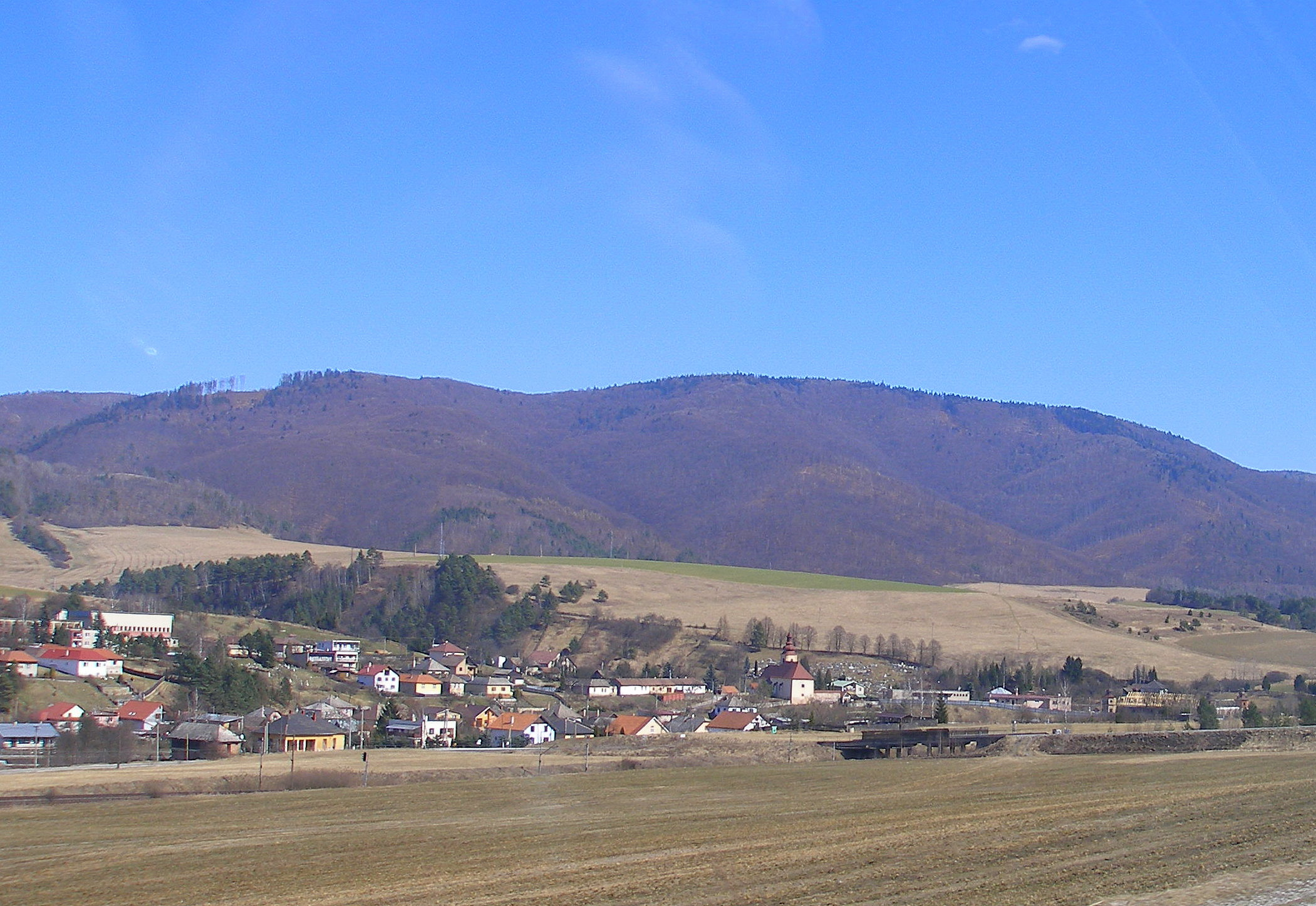 Obec Kluknava okres Gelnica, región Spiš.